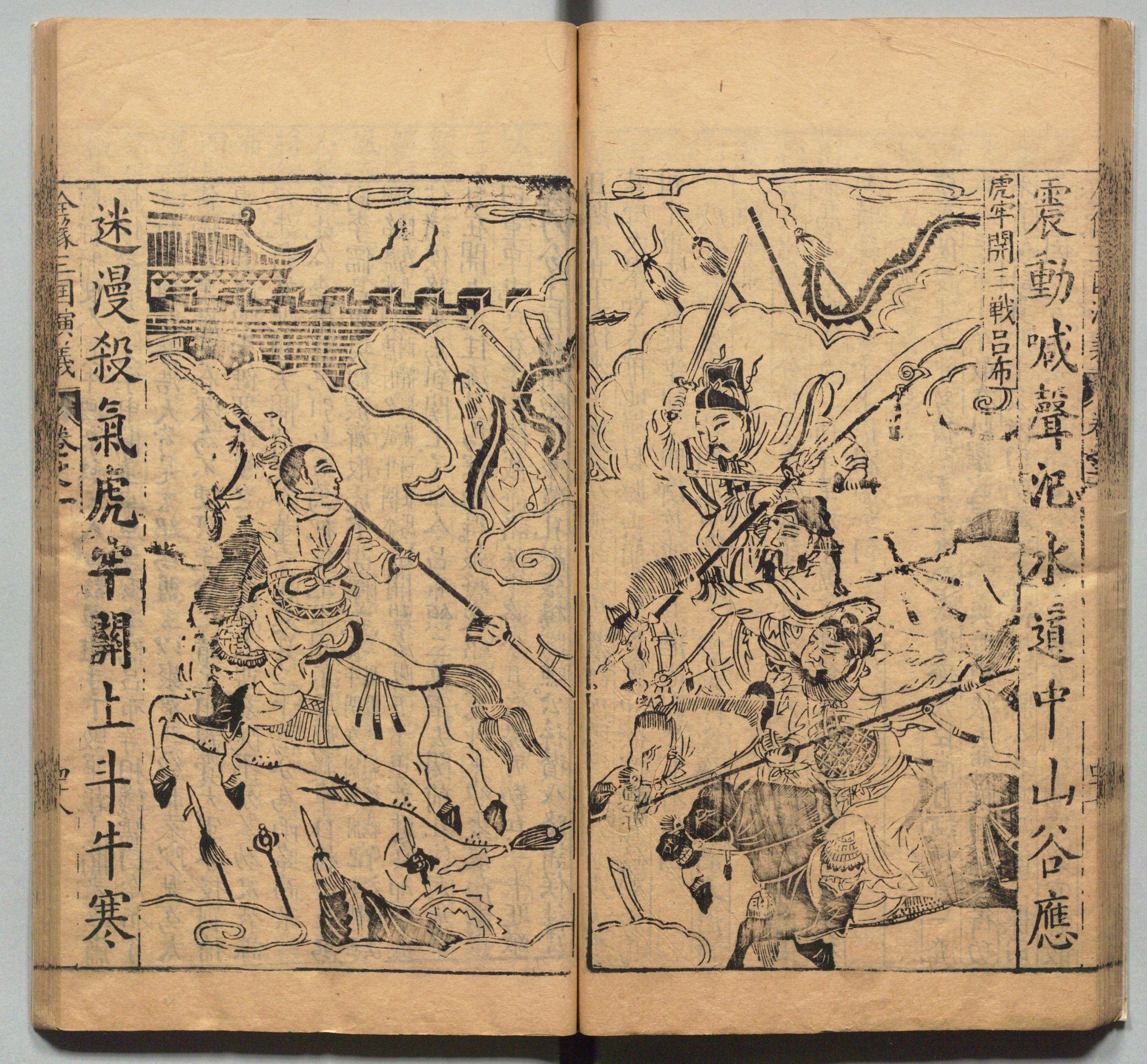 《新刊校正古本大字音释三国志通俗演义》 明万历十九年书林周曰校刊本